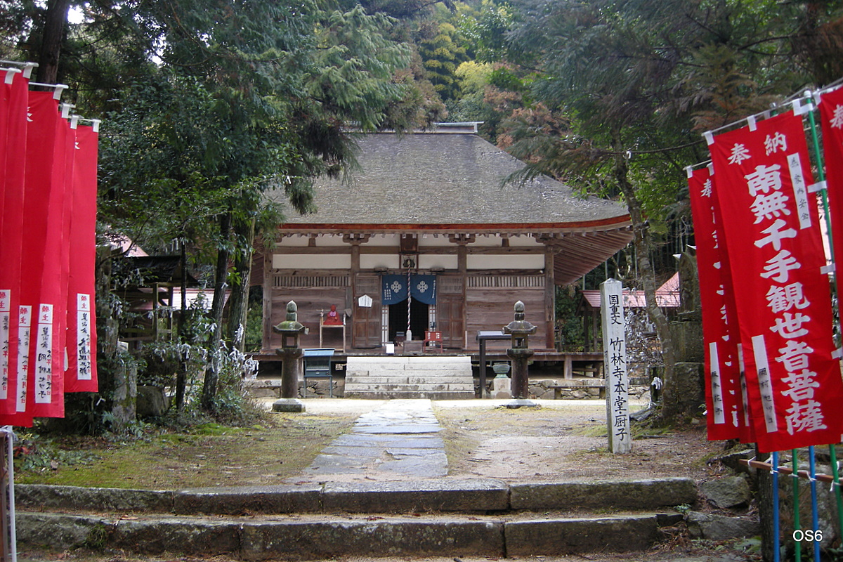 東広島市の竹林寺本堂。